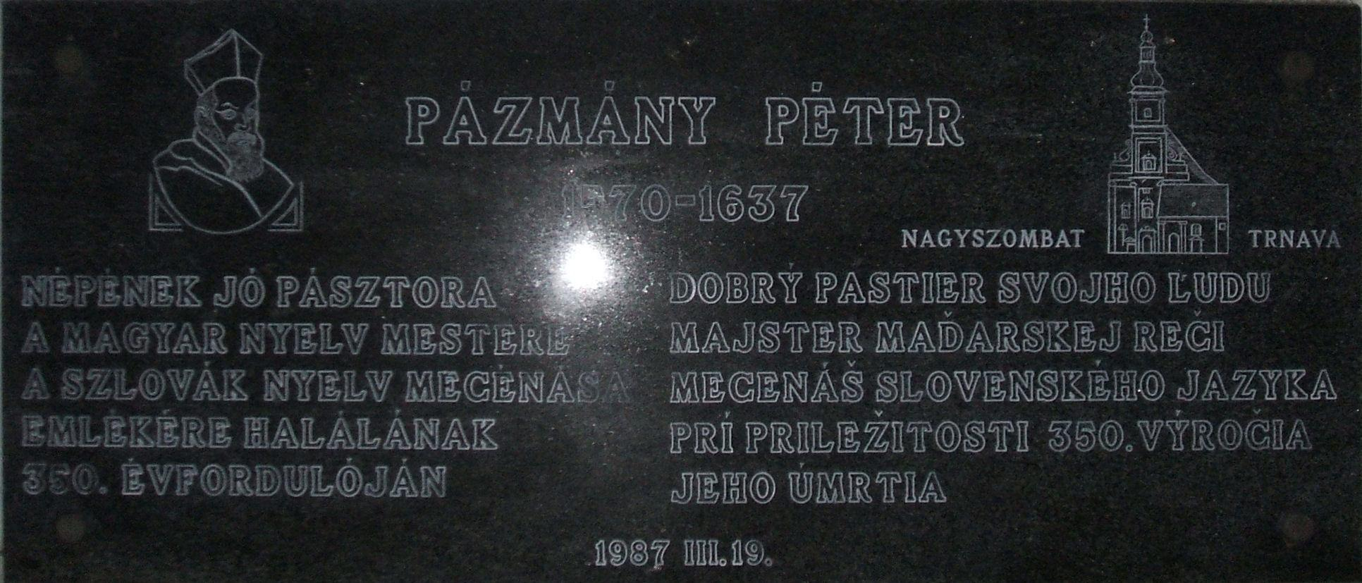 Emléktábla a szentléleki templomon